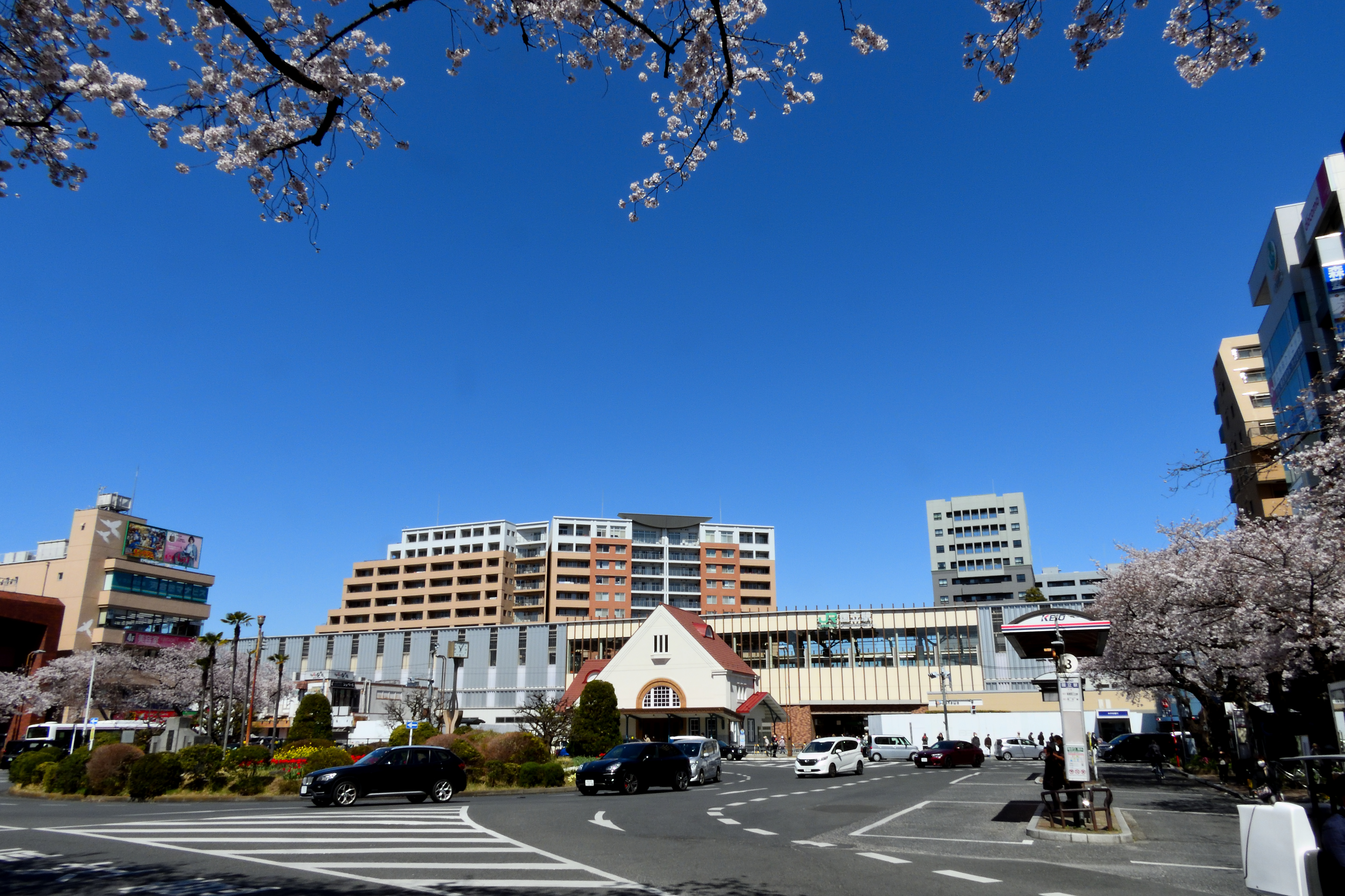 国立駅南口の風景Nikon Coolpix B700